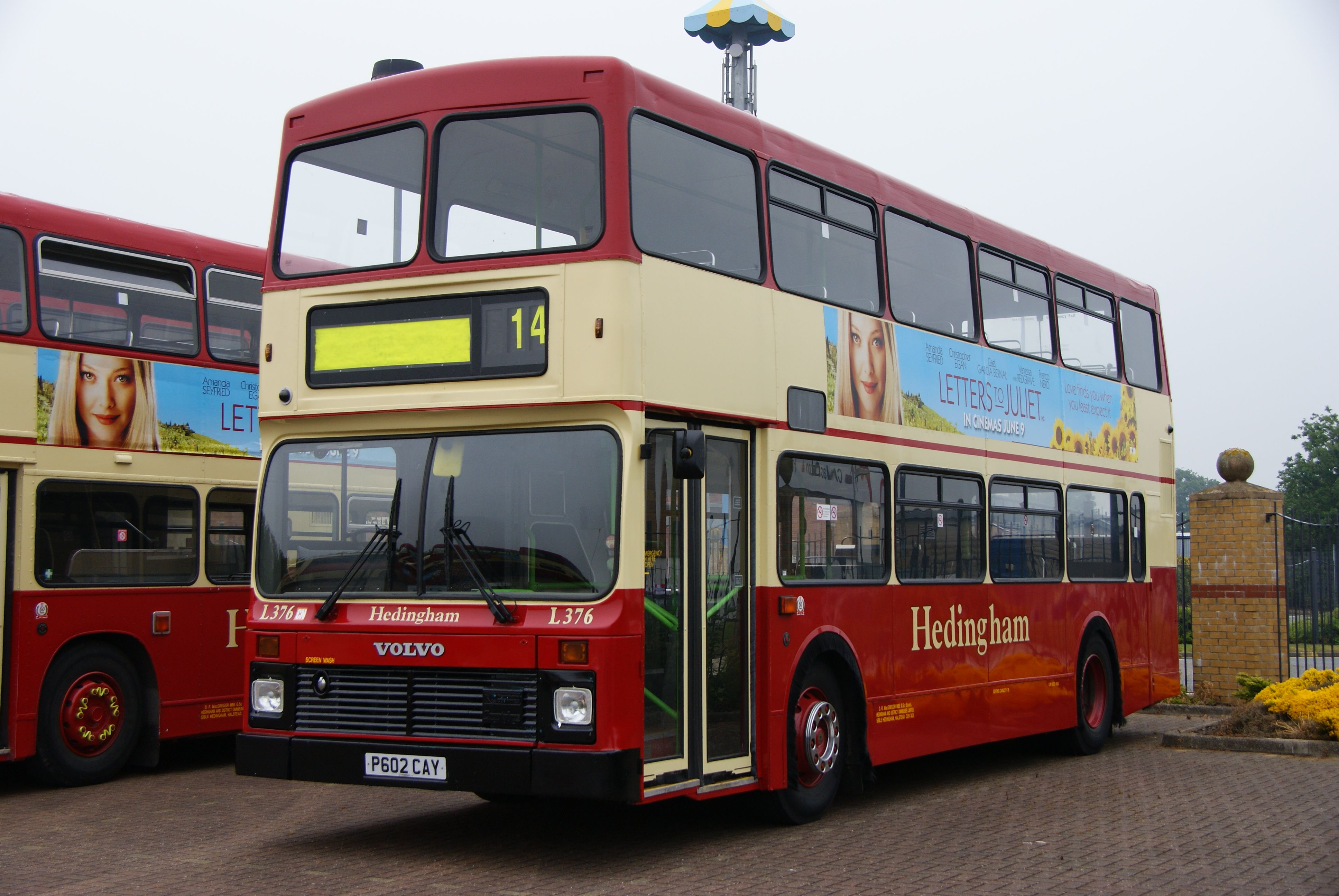 L376-P602CAY-1 060610 CPS